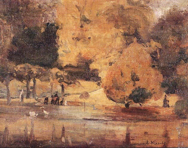 Obra do Projeto Eliseu Visconti